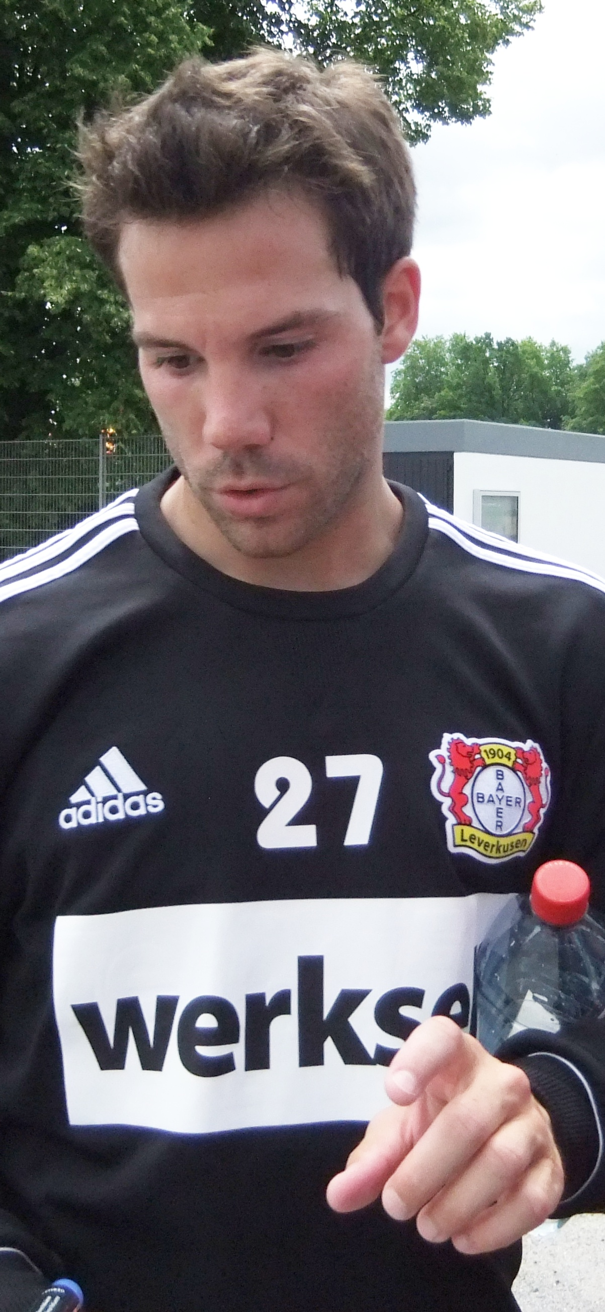 Gonzalo Castro, 2011